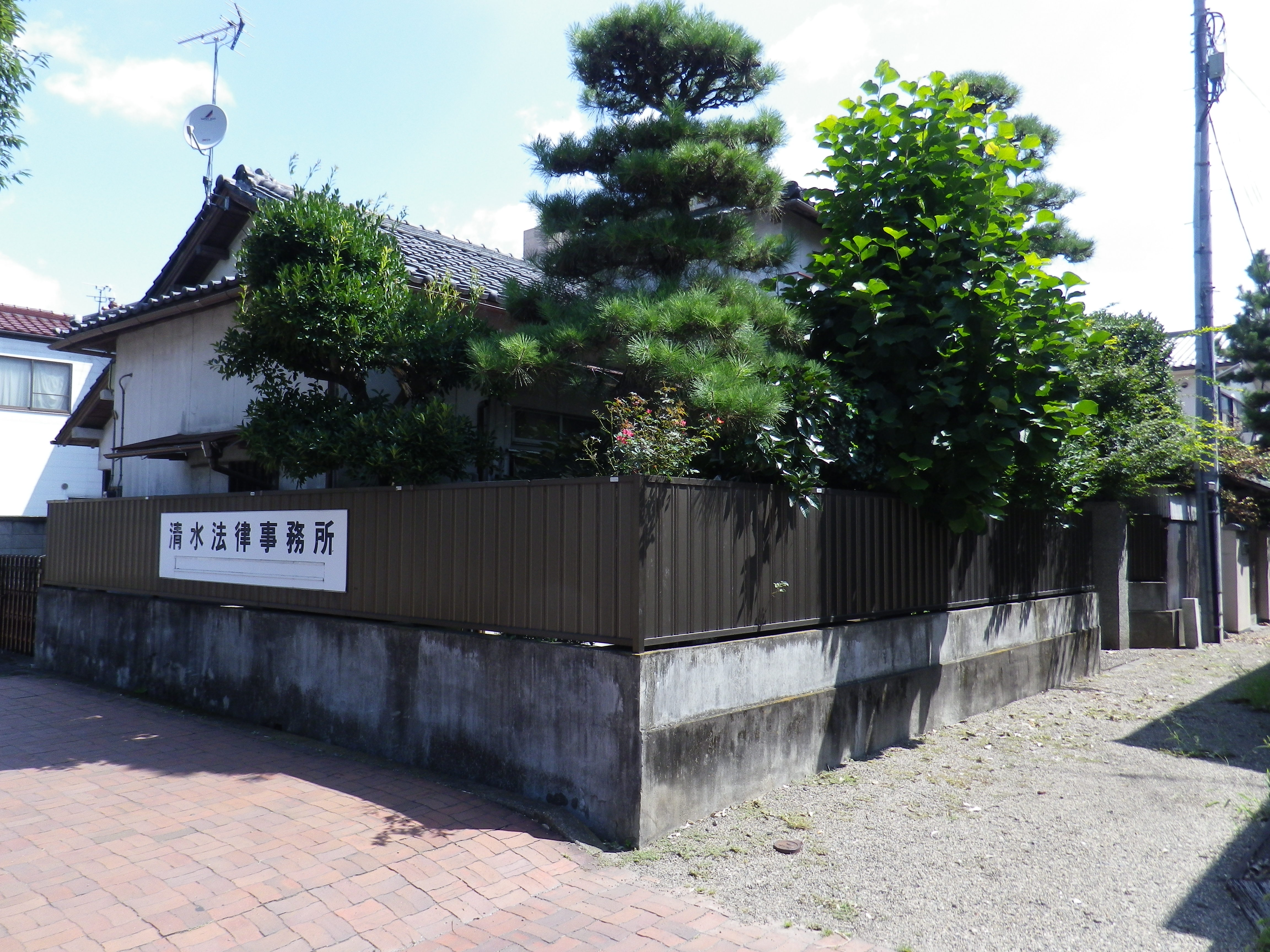 清水法律事務所（内村鑑三居宅跡）